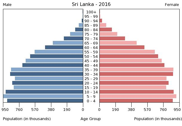 A population pyramid illustrates the age and sex structure of a country's population and may provide insights about political and social stability, as well as economic development. The population is distributed along the horizontal axis, with males shown on the left and females on the right. The male and female populations are broken down into 5-year age groups represented as horizontal bars along the vertical axis, with the youngest age groups at the bottom and the oldest at the top. The shape of the population pyramid gradually evolves over time based on fertility, mortality, and international migration trends.